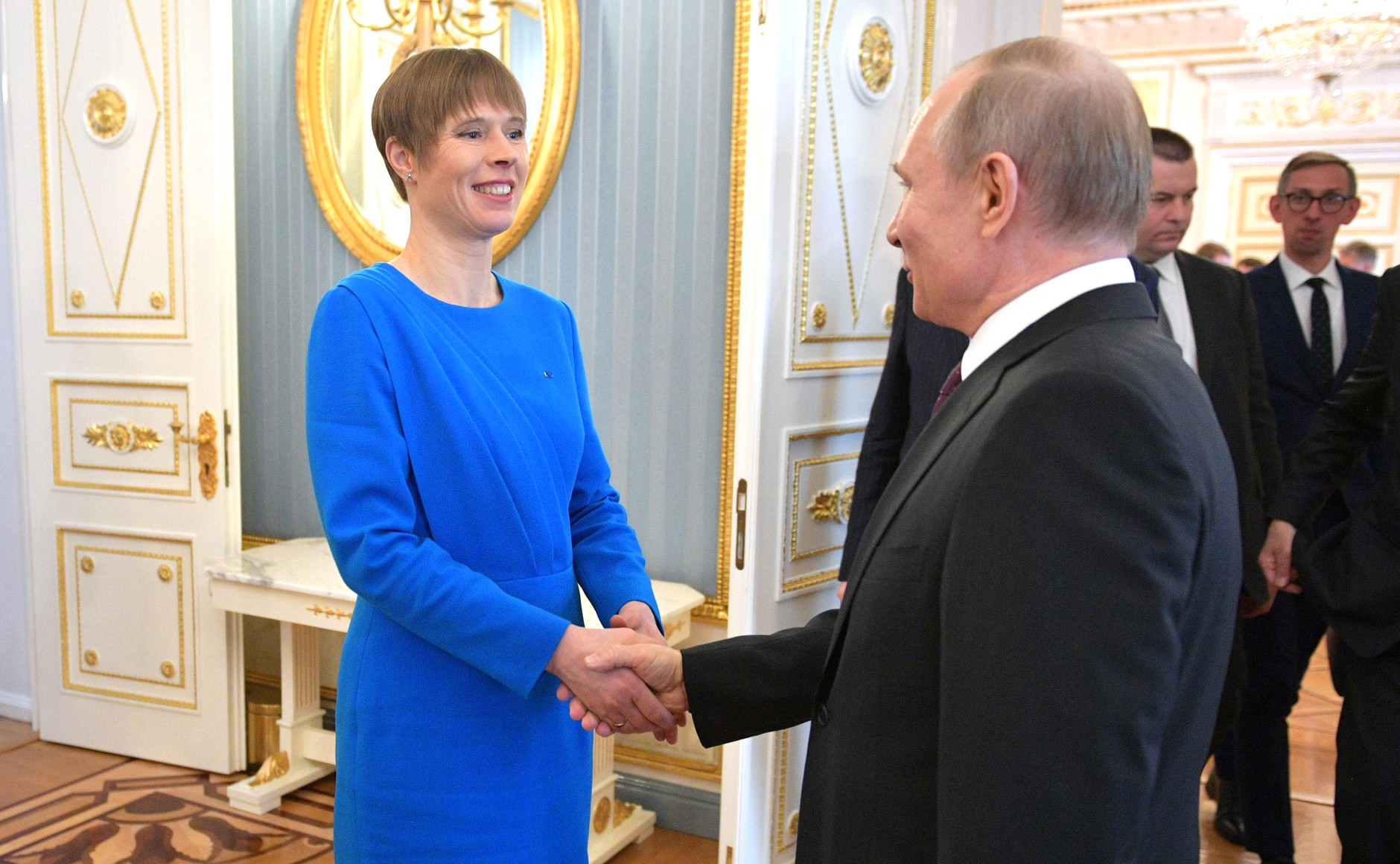 По завершении встречи Президента Российской Федерации Владимира Путина с Президентом Эстонской Республики Керсти Кальюлайд